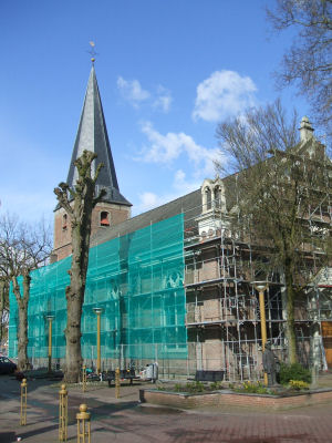 De dorpskerk van Vaassen in de steigers. Eigen foto